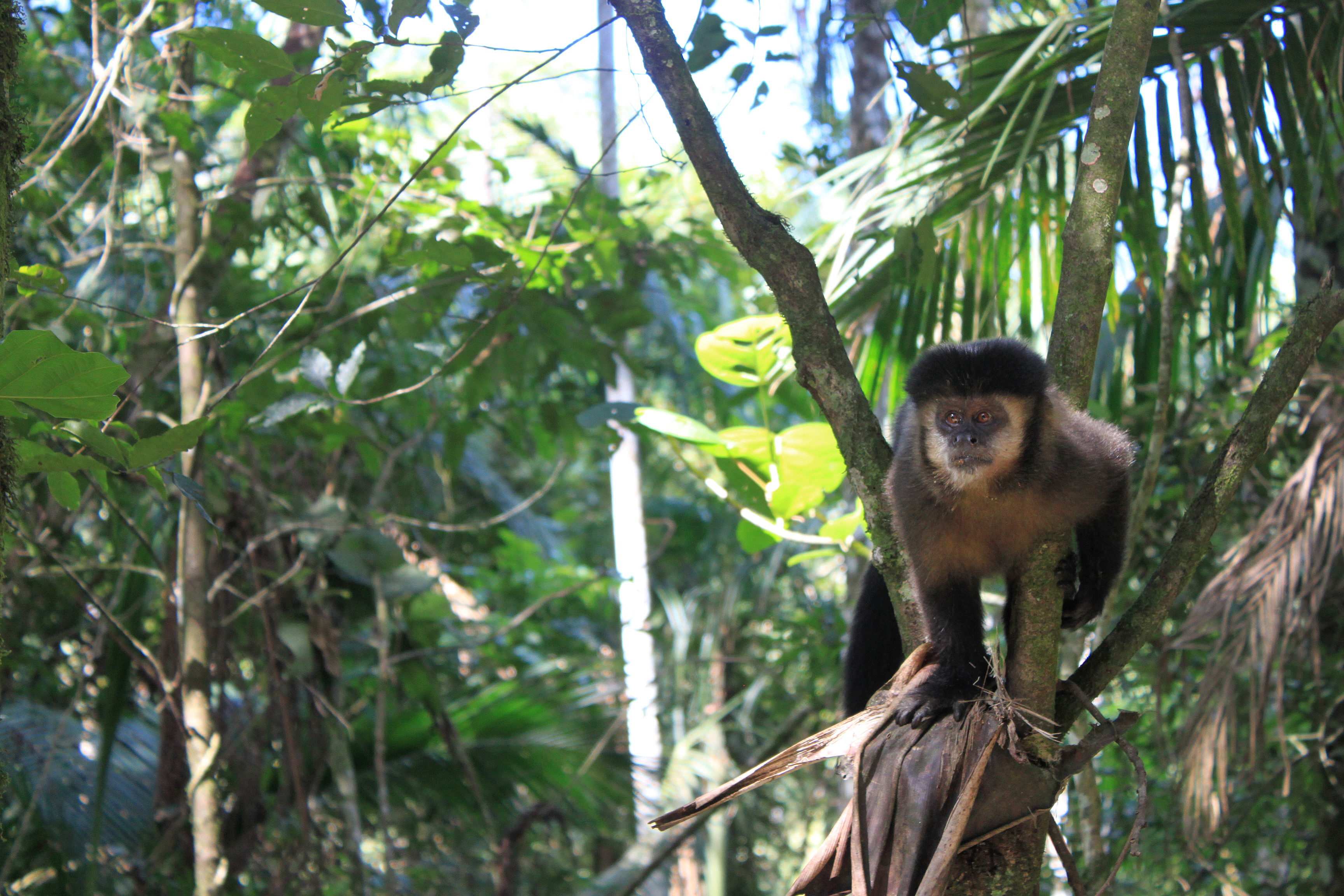 Macaco prego visto na parte baixa do PARNA Itatiaia